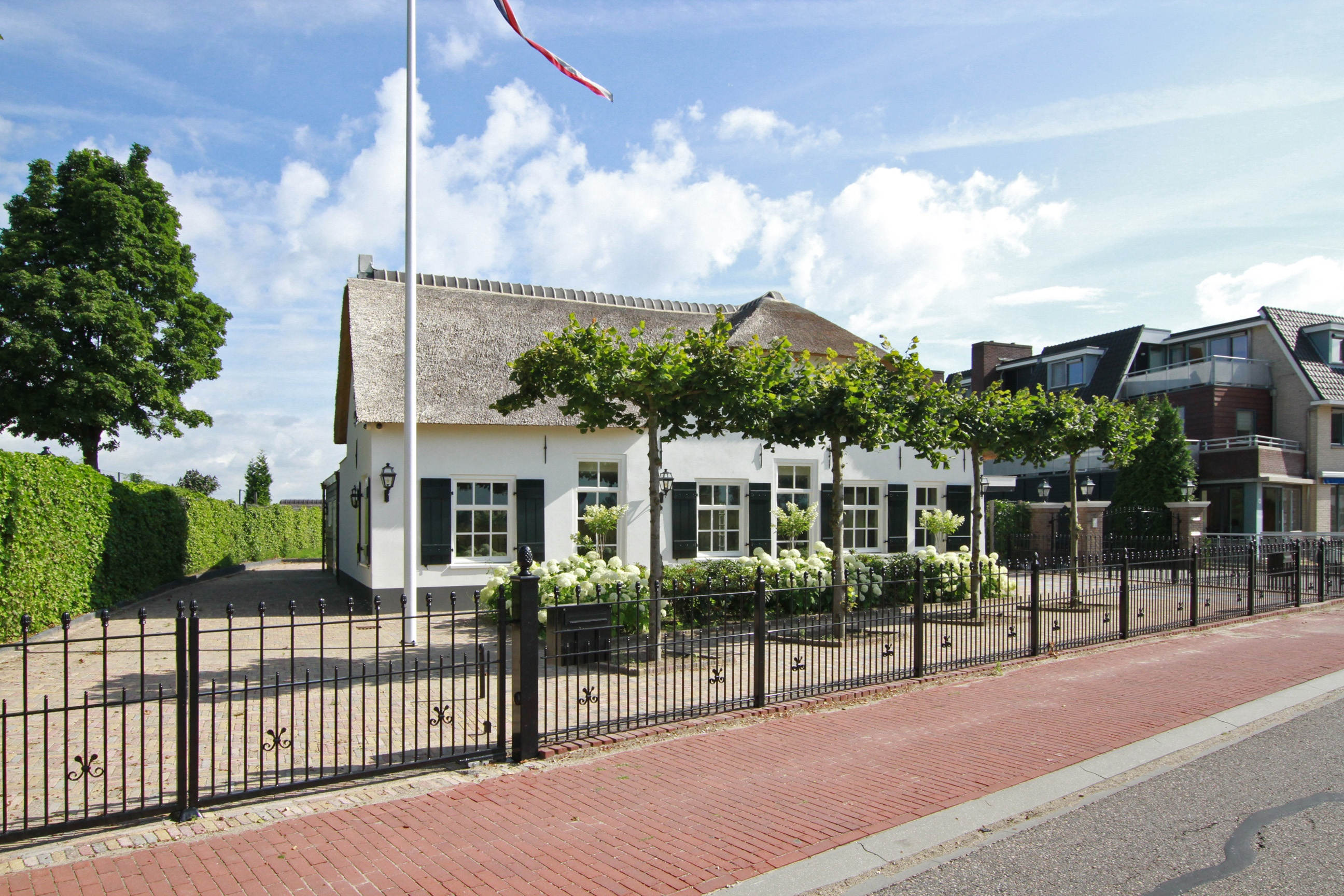 Dwarshuis Oud-Loosdrecht